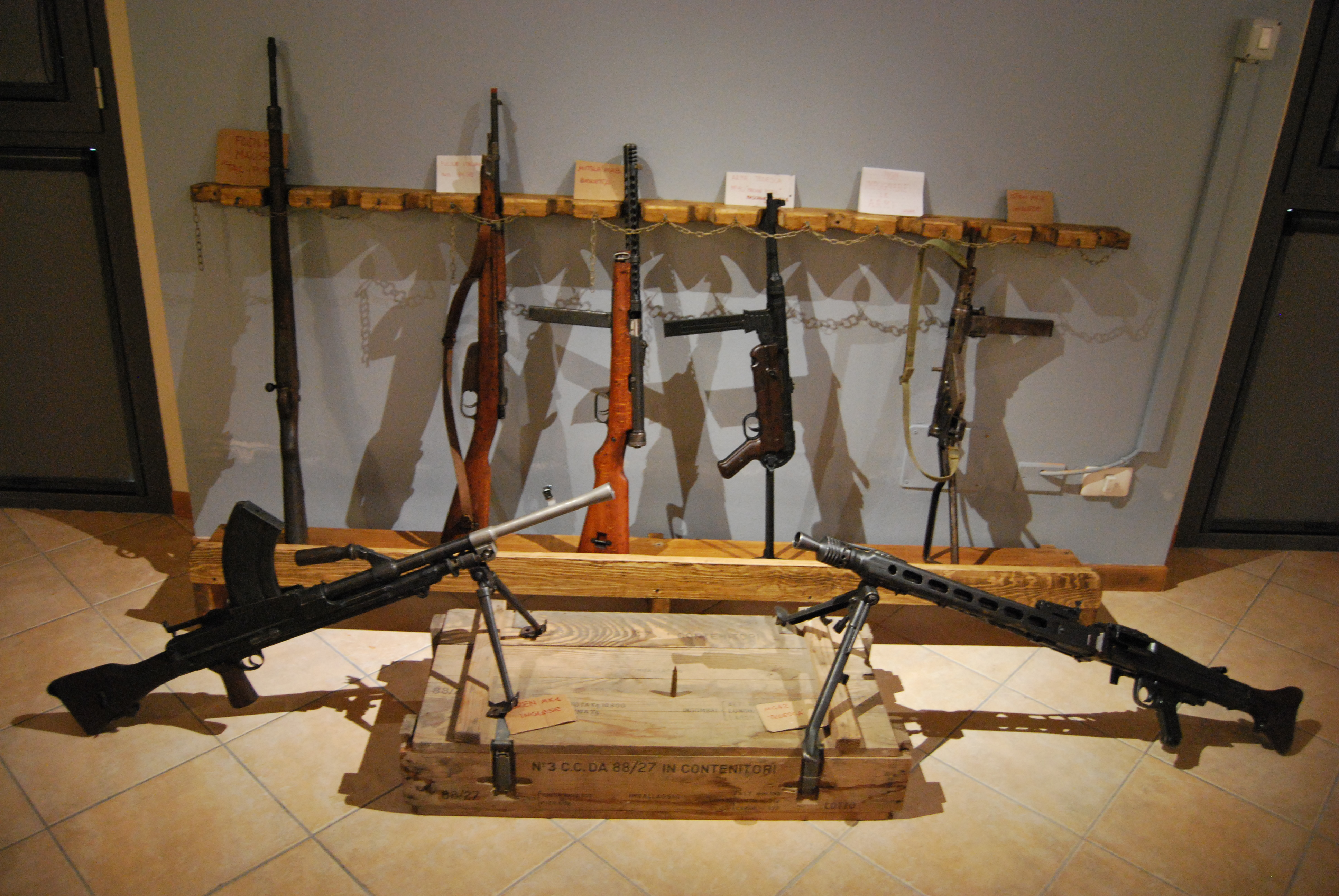 Chiara Carrera, opera propria, armi, pubblica